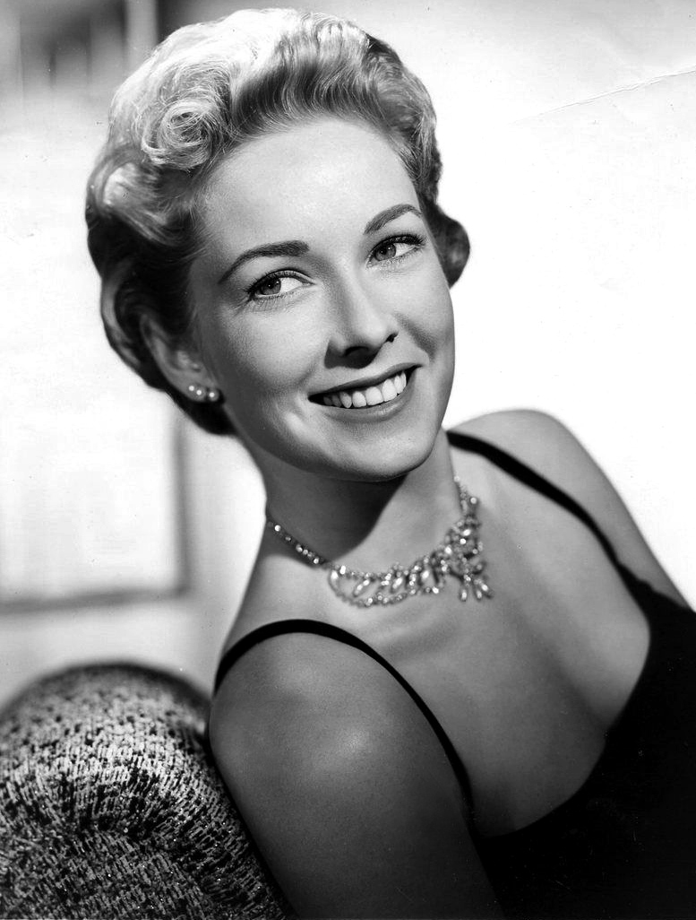 Publicity photo of Vera Miles